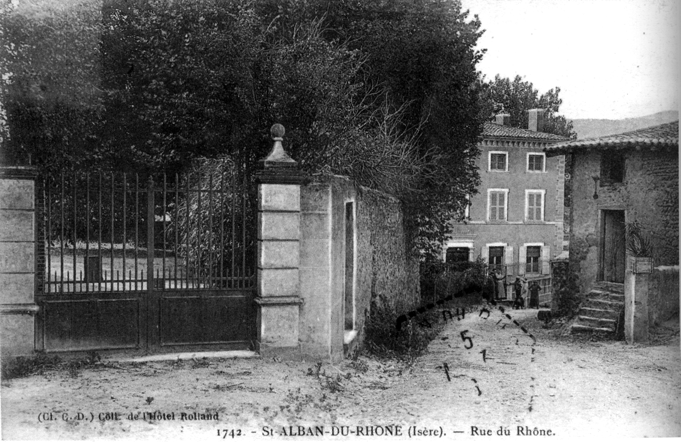 Saint-Alban-du-Rhone rue du Rhone, 1925